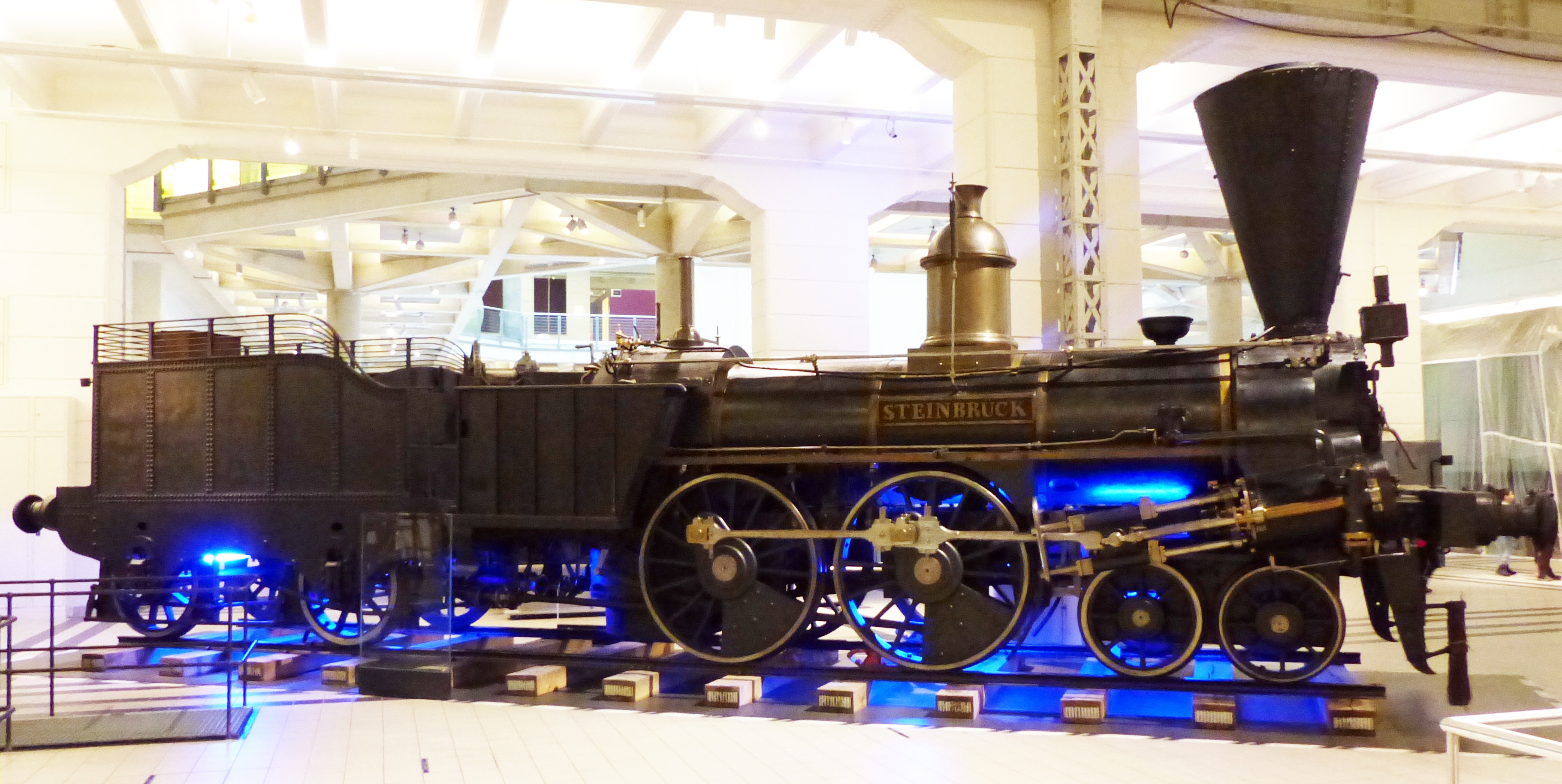 SStB-Lokomotive Steinbrück, Dampflokomotive der Südbahn, Wien-Gloggnitzer Eisenbahn anno 1848; älteste Lokomotive heimischer Produktion, gebaut von John Haswell in der Maschinenfabrik der Wien-Gloggnitzer Eisenbahn; Exponat im Technischen Museum Wien